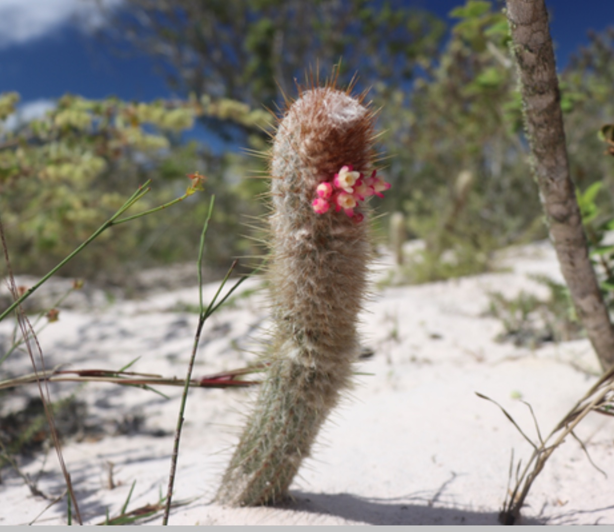 Micranthocereus polyanthus ssp. alvinii Bahia Brasil